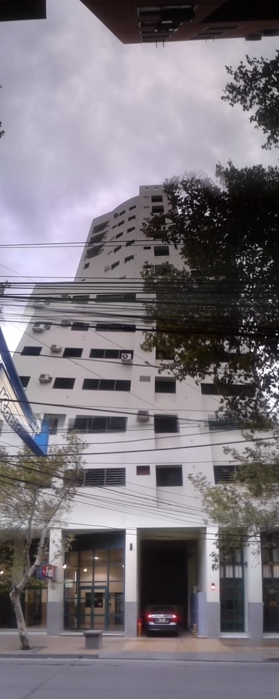 Torre de oficinas y departamnetos de Diario de Cuyo